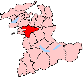 Description: District de Berne dans le canton de Berne Auteur: Voyager License: GFDL